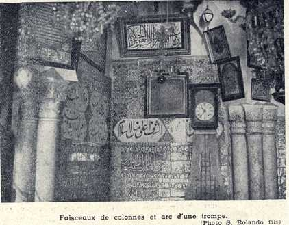 Détail ornementaux : Calligraphie, voute et colonnes de la mosquée Sidi Abderrahmane (Alger)